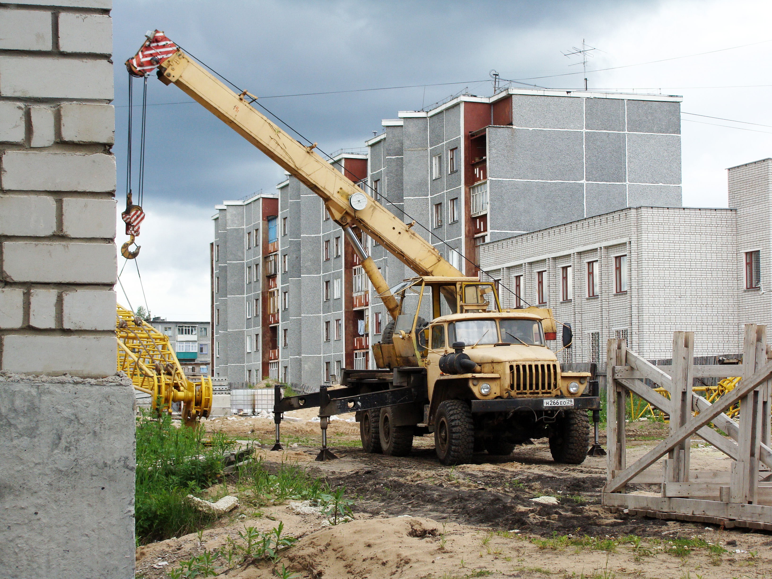 Автокран на базе Урал, Коряжма